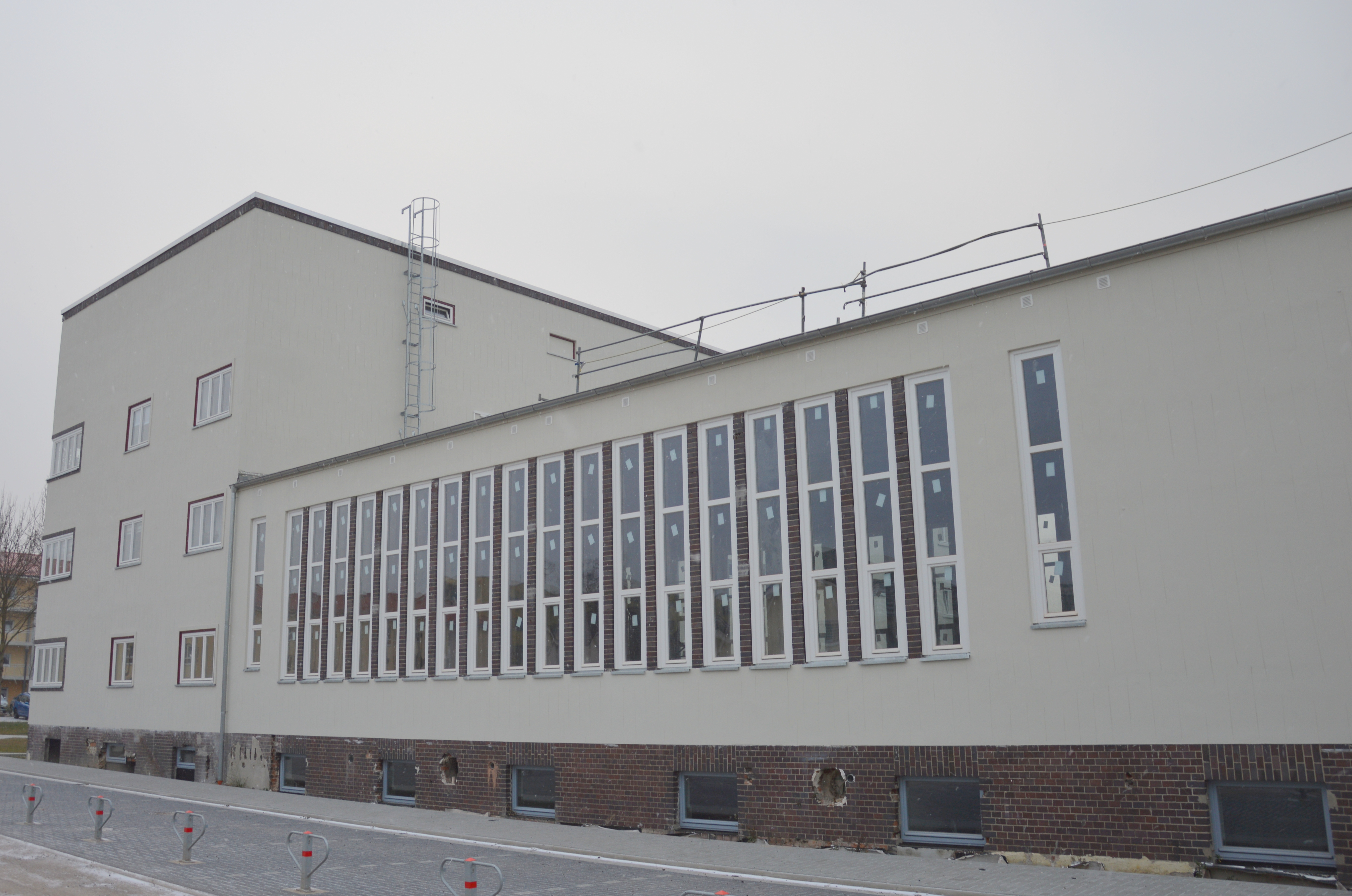 Haus Emanuel-Larisch-Weg 21 in Magdeburg